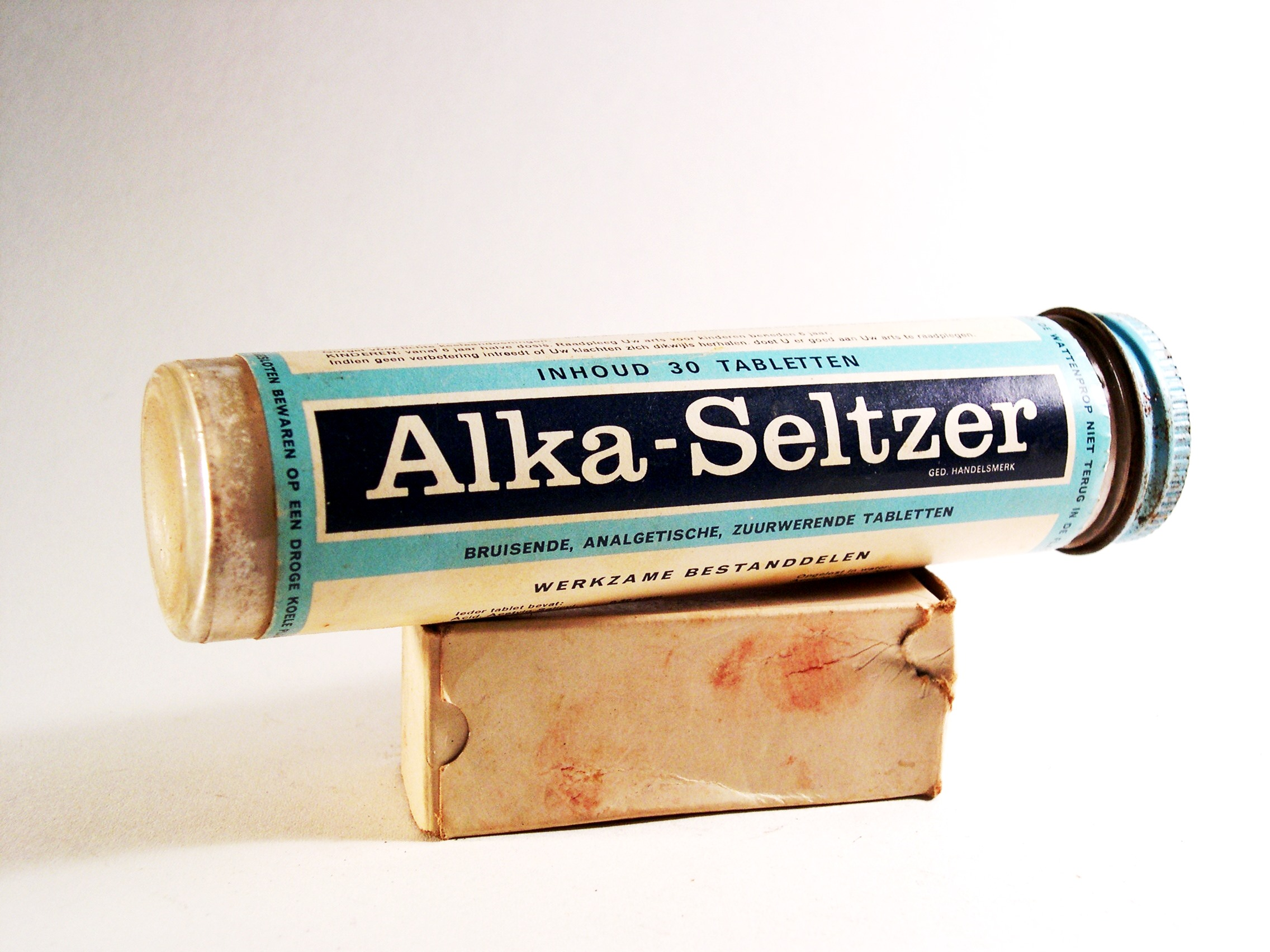 inhoud 30 tabletten , bruisende, analgetische, zuurwerende tabletten